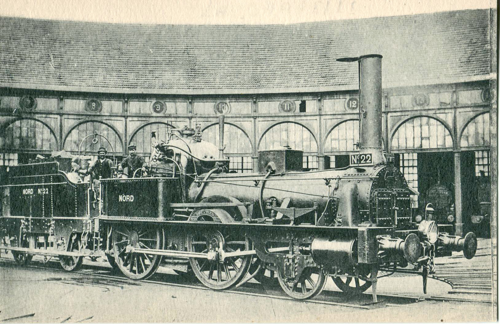 Carte postale ancienne éditée par HMP, n°1214 :Locomotives du Nord - Locomotive n°22.Vue prise au Dépôt de La Chapelle